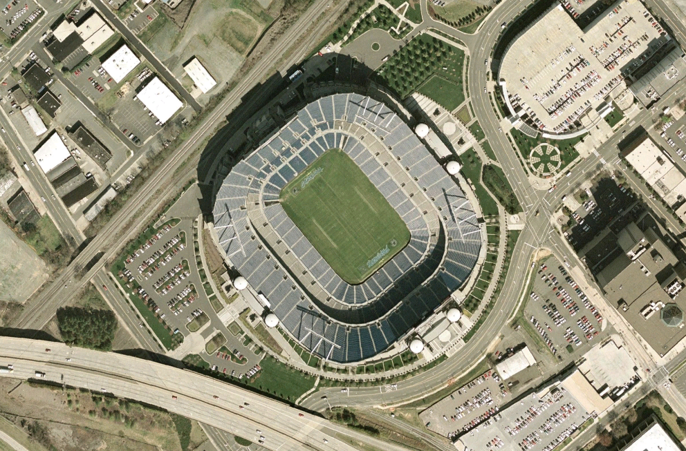 5 août 2006 à 20:50 . . Betp . . 992×653 (1 461 454 octets) (nasa world wind 1.3.5)